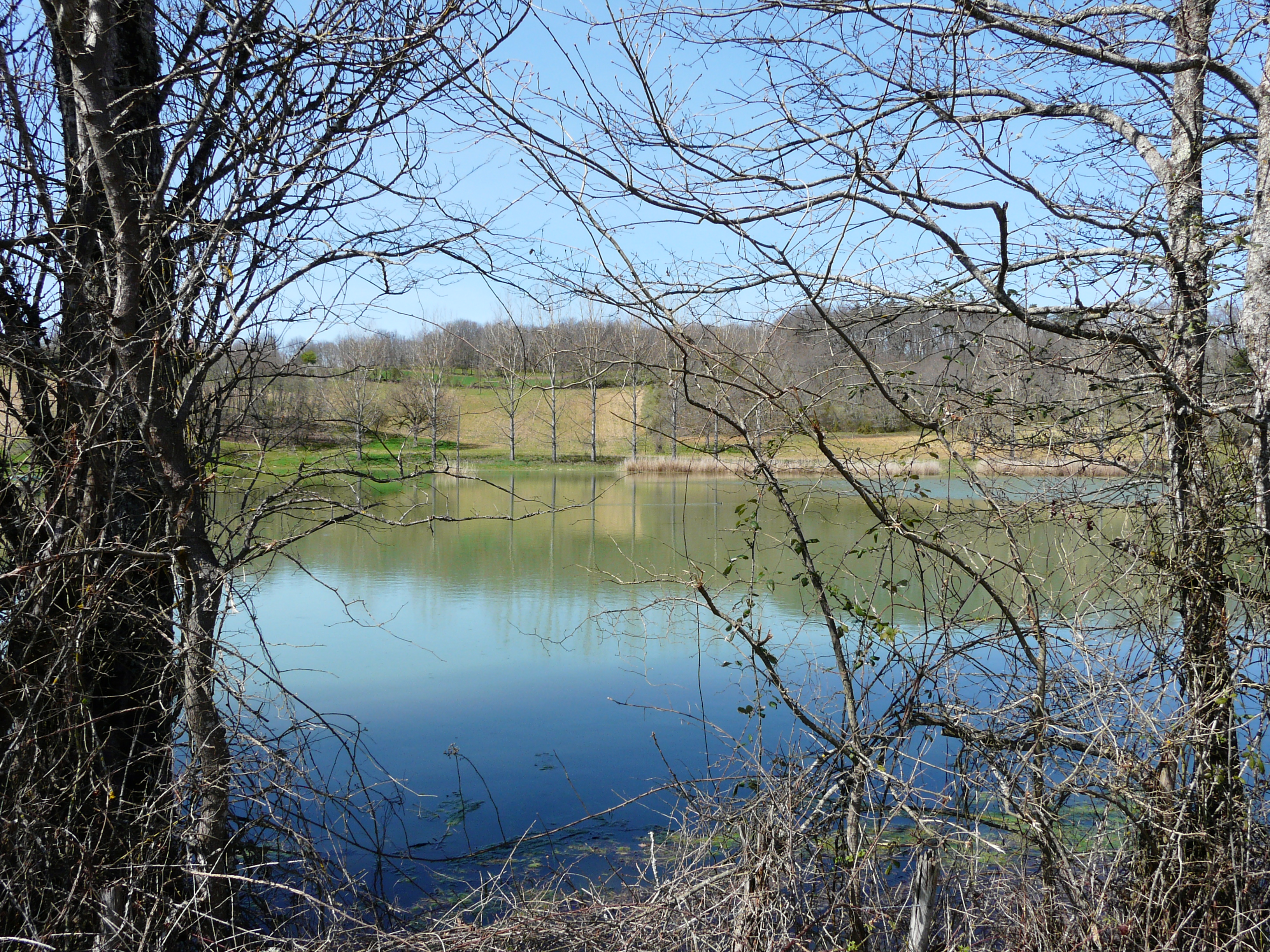 L'étang du Moulin de Durestal sur la Louyre, Cendrieux, Dordogne, France.